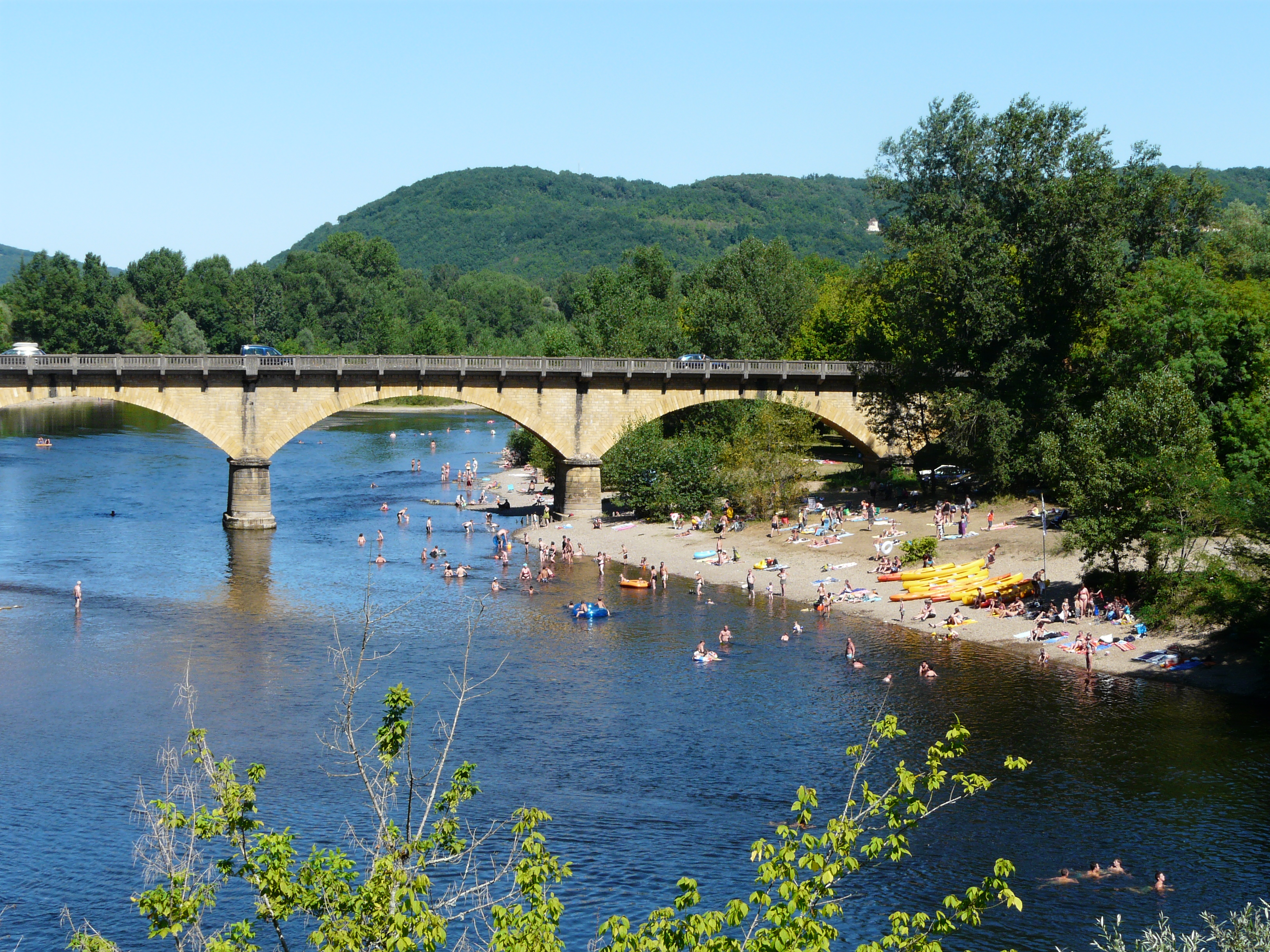 La Dordogne en aval du pont de Rouffillac, Saint-Julien-de-Lampon, département de la Dordogne, France.